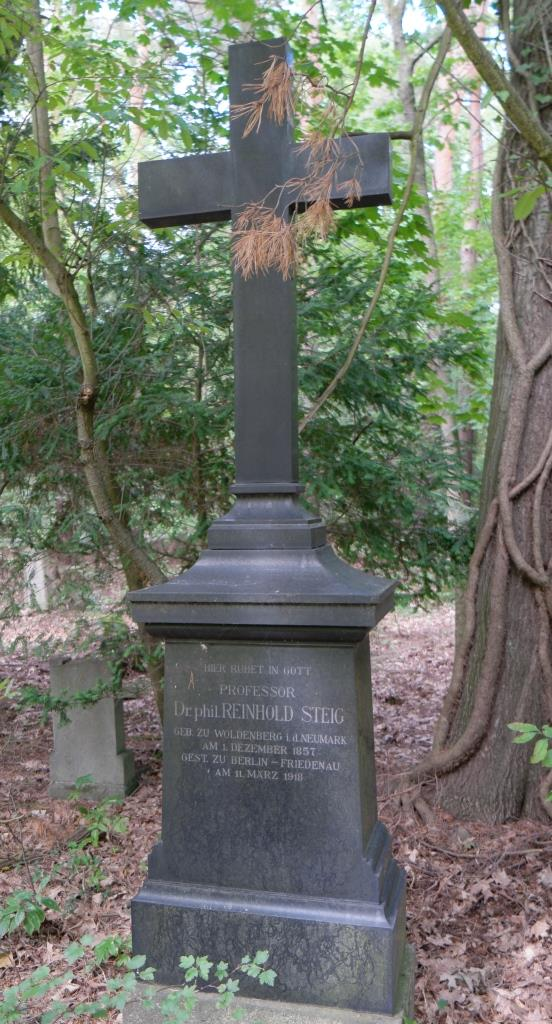 Grab des Literaturhistorikers Reinhold Steig (1857-1918) auf dem Südwestkirchhof in Stahnsdorf